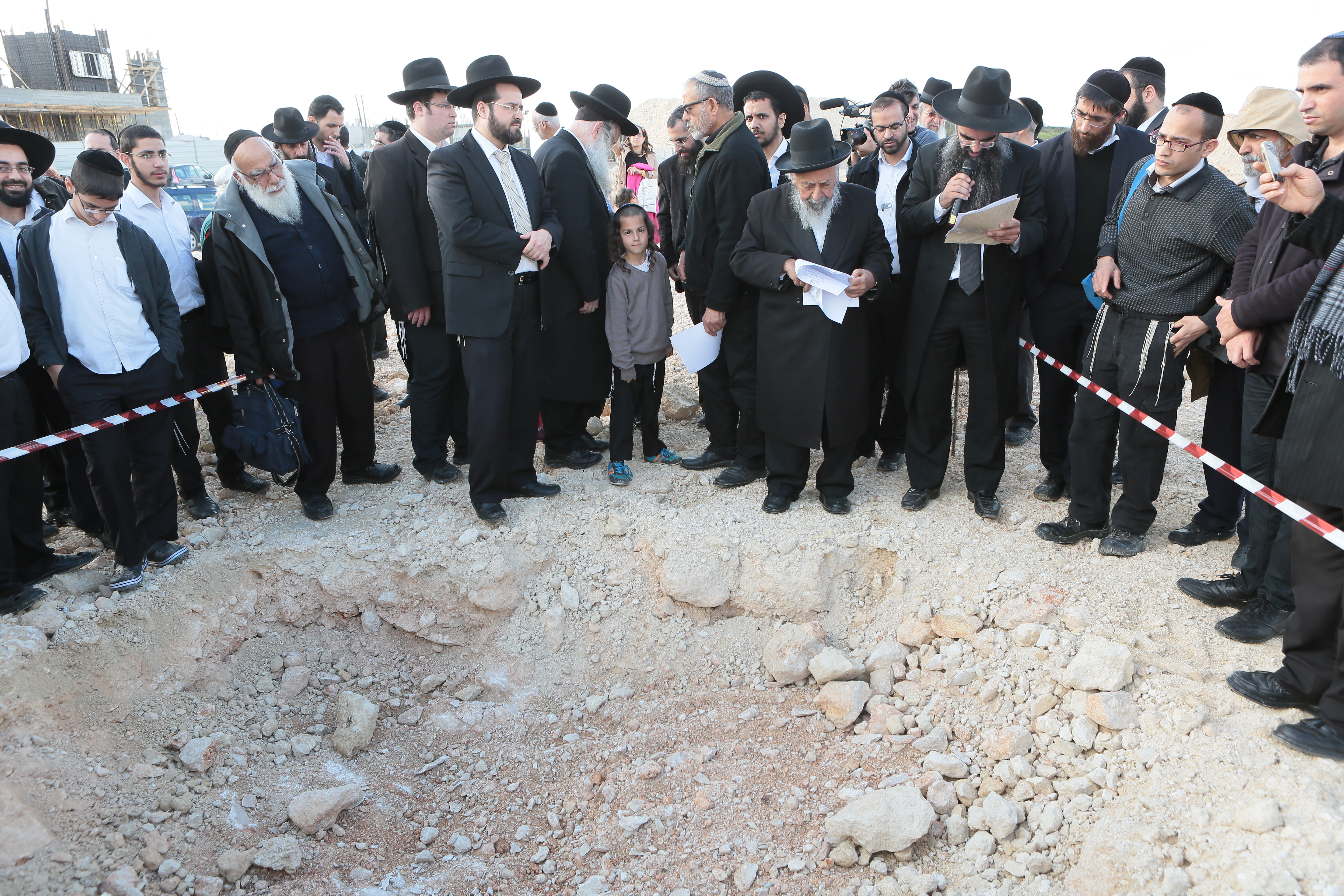 טקס הנחת אבן הפינה לעיר חריש. במרכז התמונה הרב שמעון בעדני